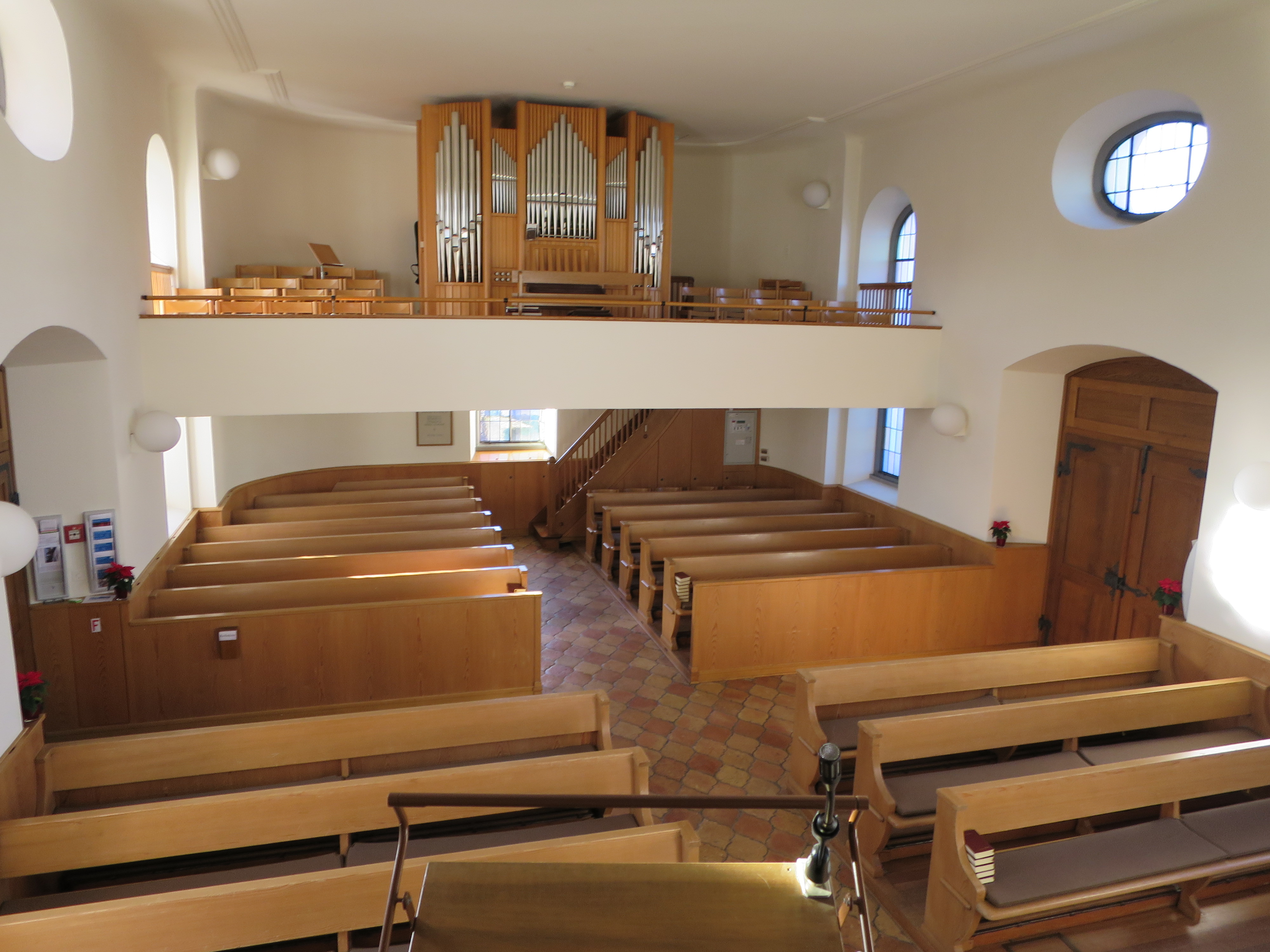 1812-1813 von Hans Conrad Bluntschi erbaut